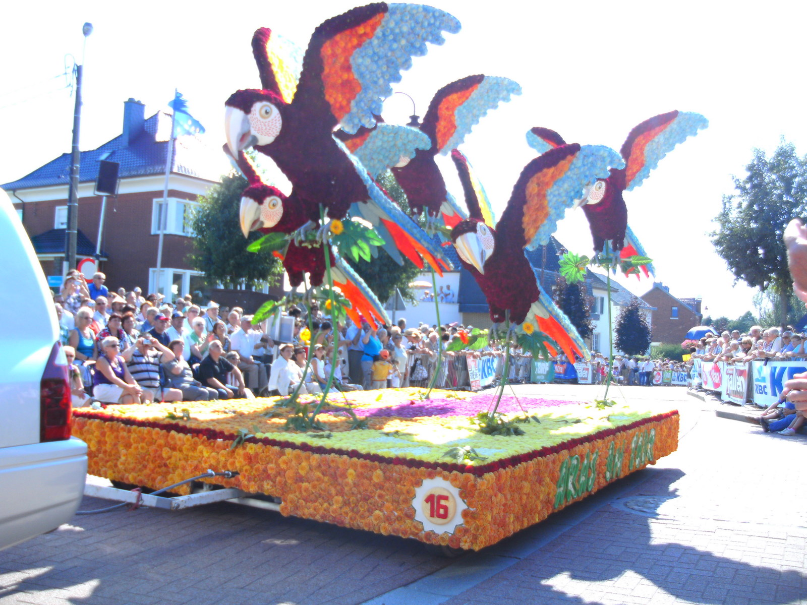 Blumenkorso in Hergenrath im Jahr 2009